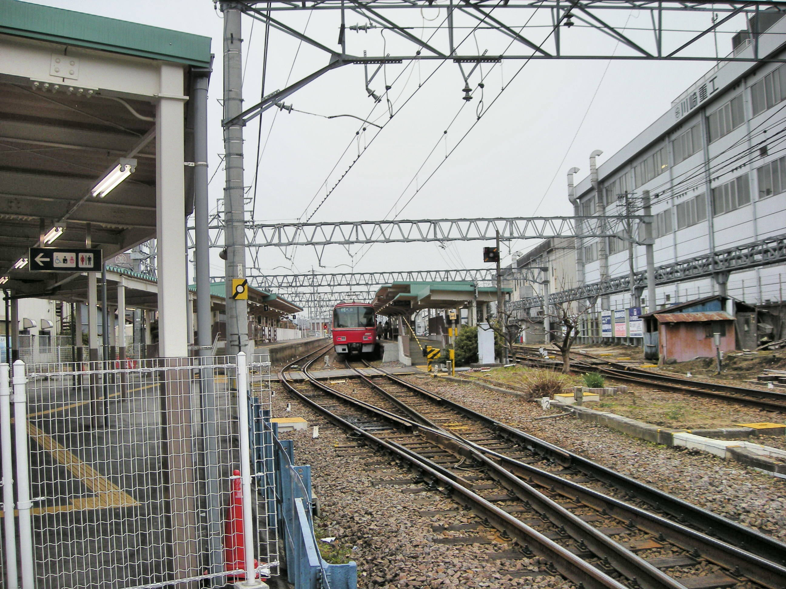 kakamigaharashiyakusyomae station（三柿野駅）